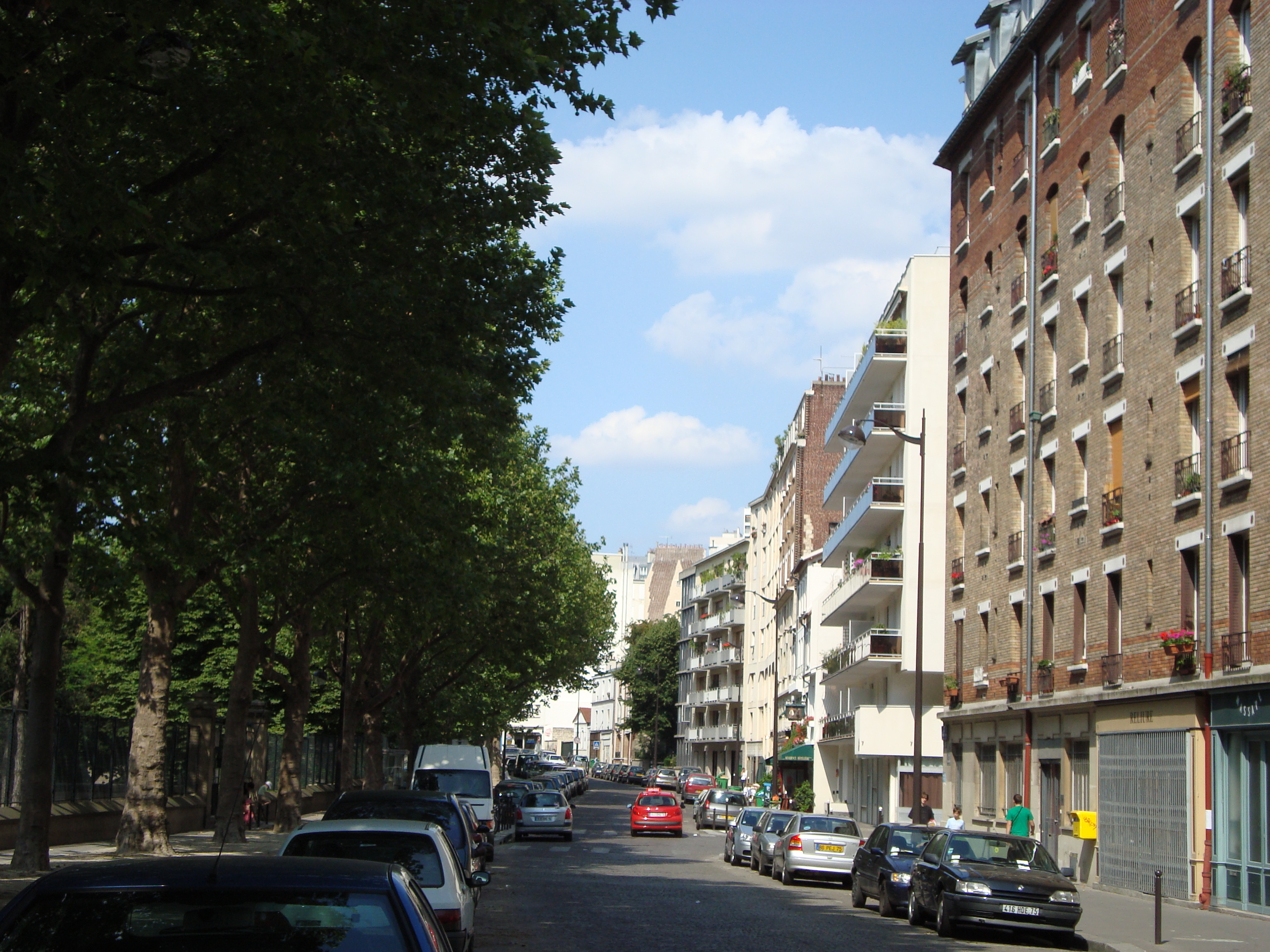 Rue Croulebarbe dans le 13 arrondissement de Paris, square René-Le Gall sur la gauche